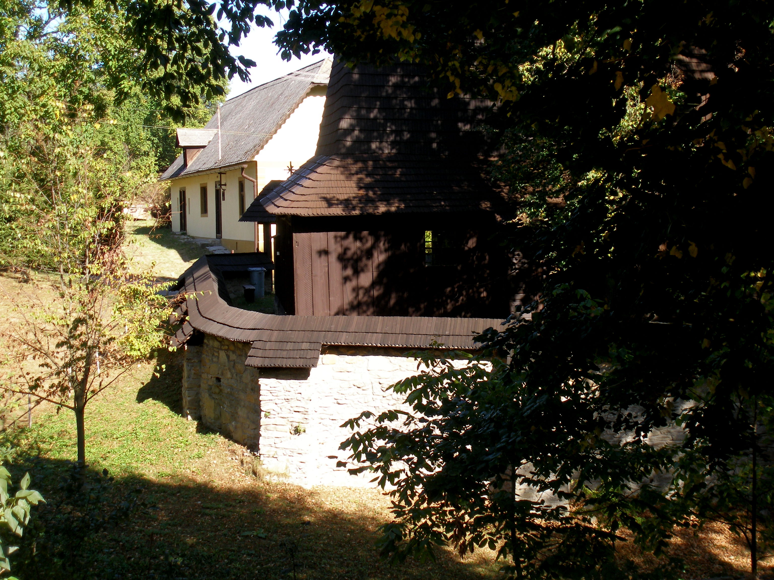 Šarišská obec Hervartov okres Bardejov.